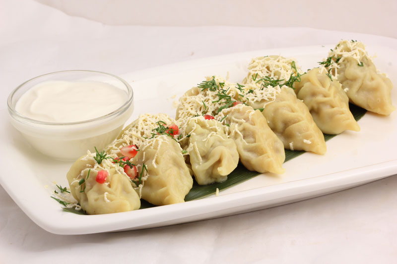 Азербайджанское блюдо Гюрза, сфотографировано в ресторане, Баку